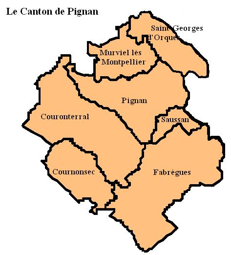 Le Canton de Pignan Image personnelle